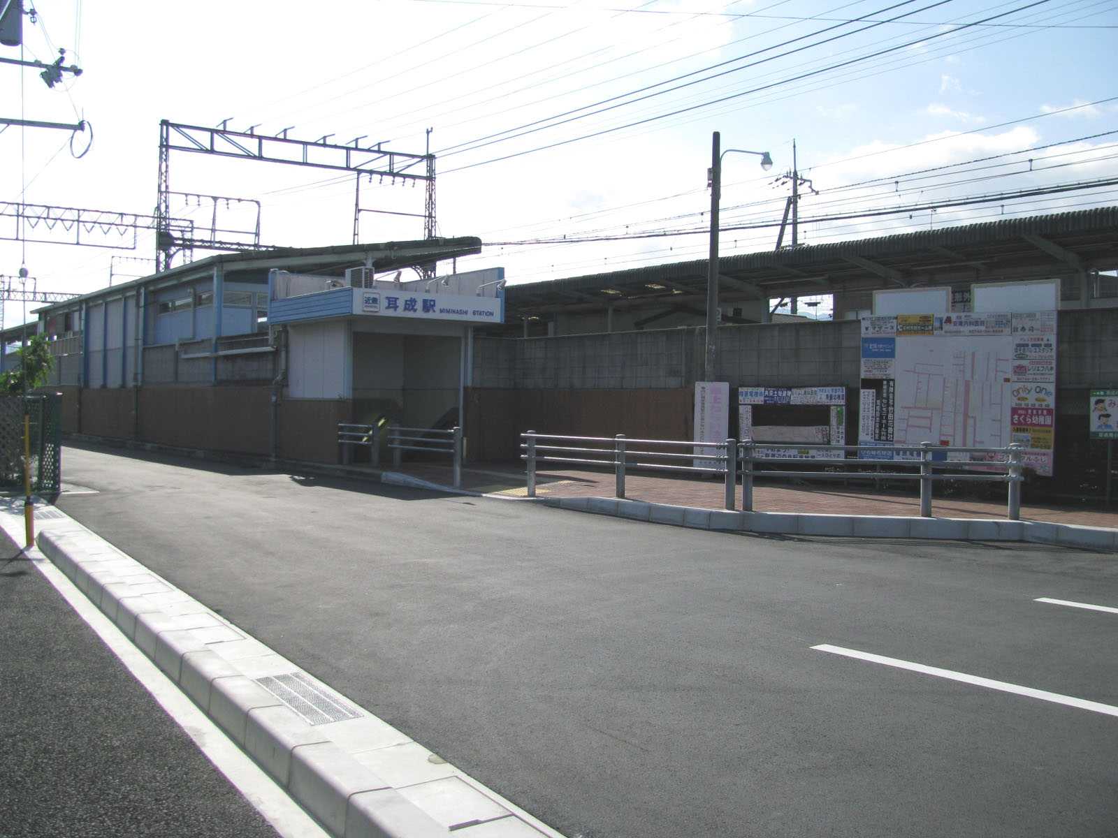 近鉄線耳成駅